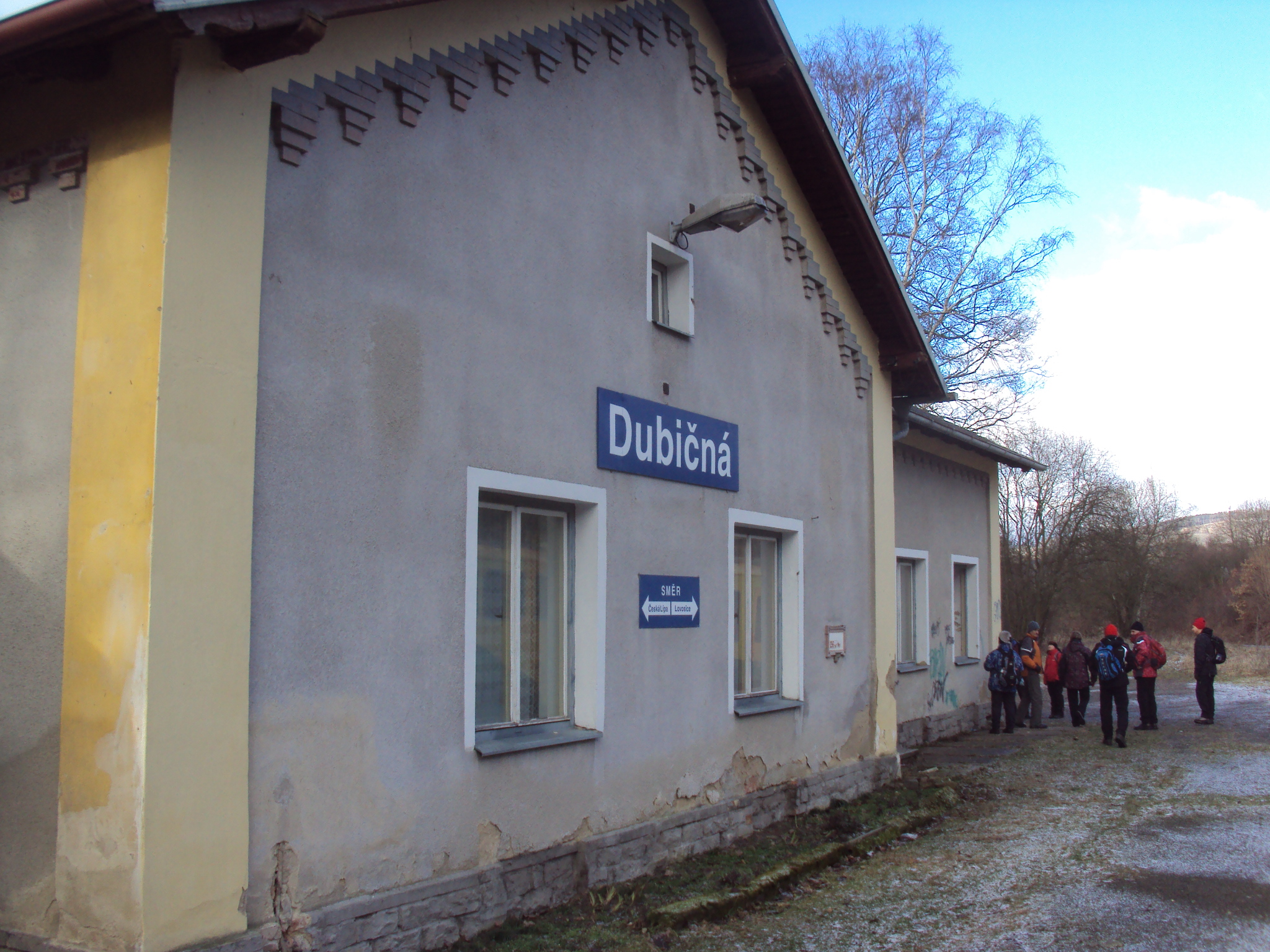 Železniční zastávka Dubičná u Úštěka